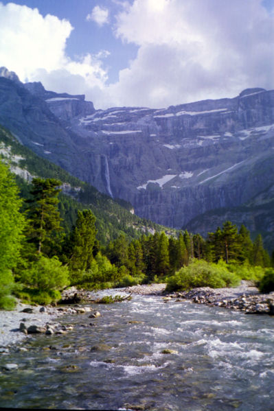 Cirque de Gavarnie, French Pyrenees.